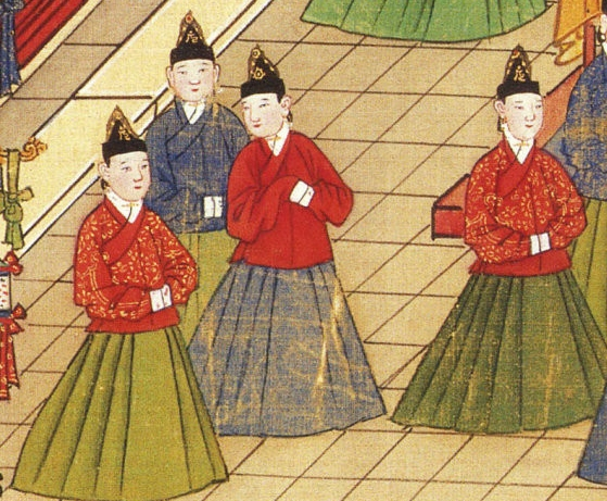 中文（香港）: 明憲宗元宵行樂圖